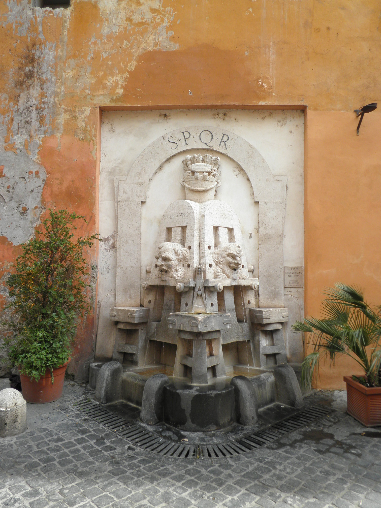 Roma, la fontana di via Margutta (1927), detta Fontana degli Artisti.